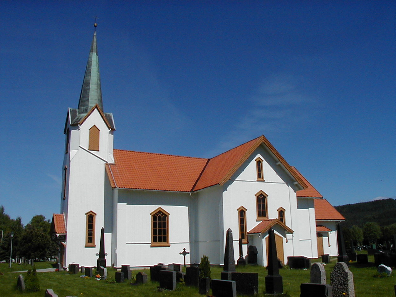 Brandval kirke, Norway